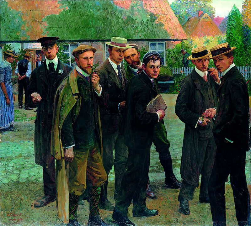 Gemälde von Arthur Siebelist: Meine Schüler und ich (1902)